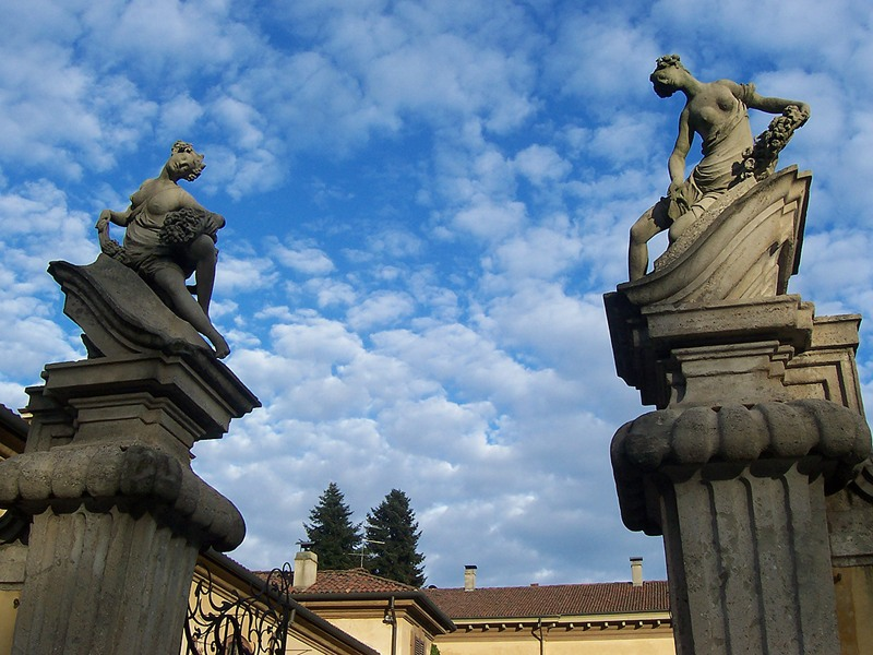 Canonica Lambro - Ingresso a Villa Taverna